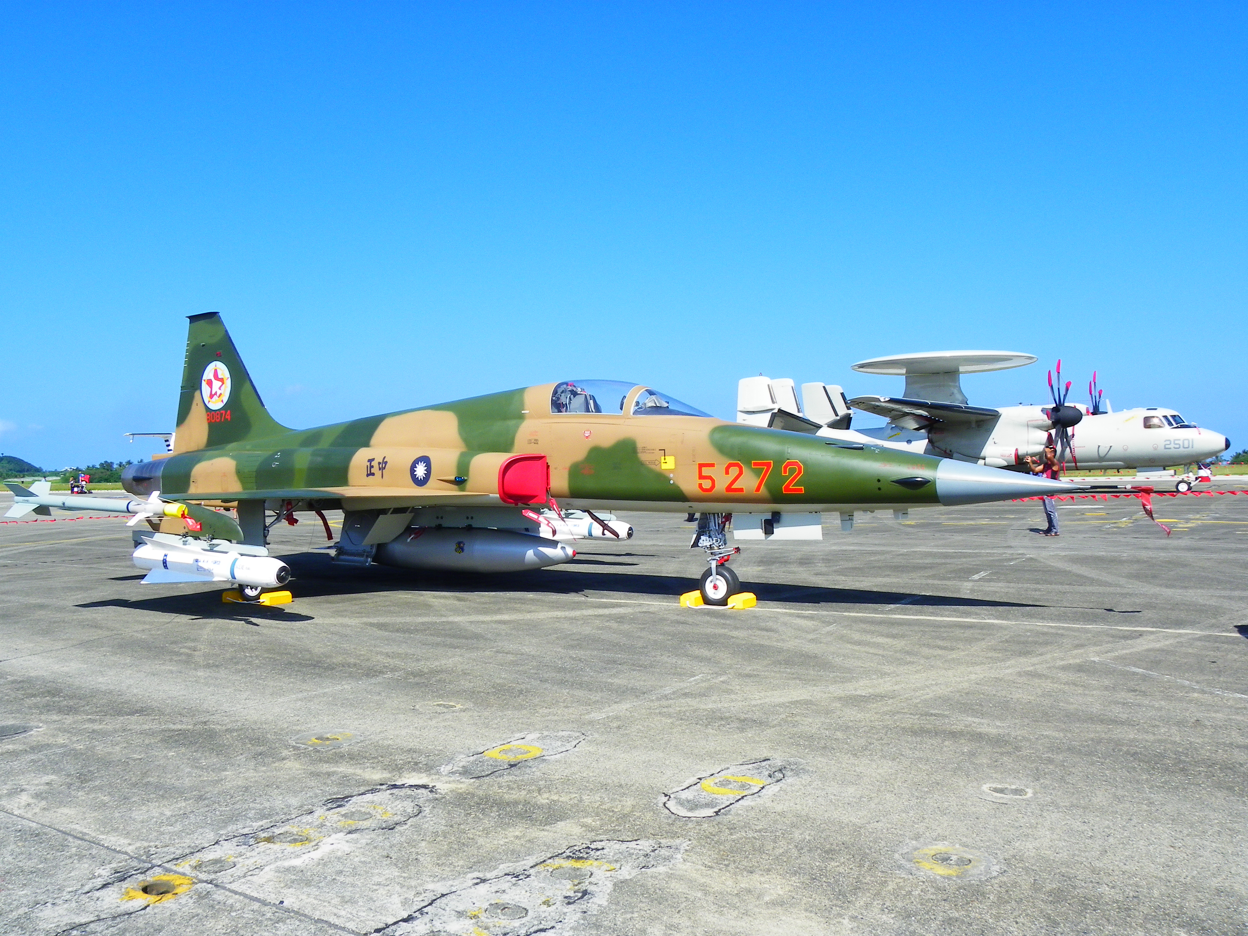 2013年空軍志航基地營區開放活動，停機坪靜態展示的空軍737聯隊F-5E 5272。